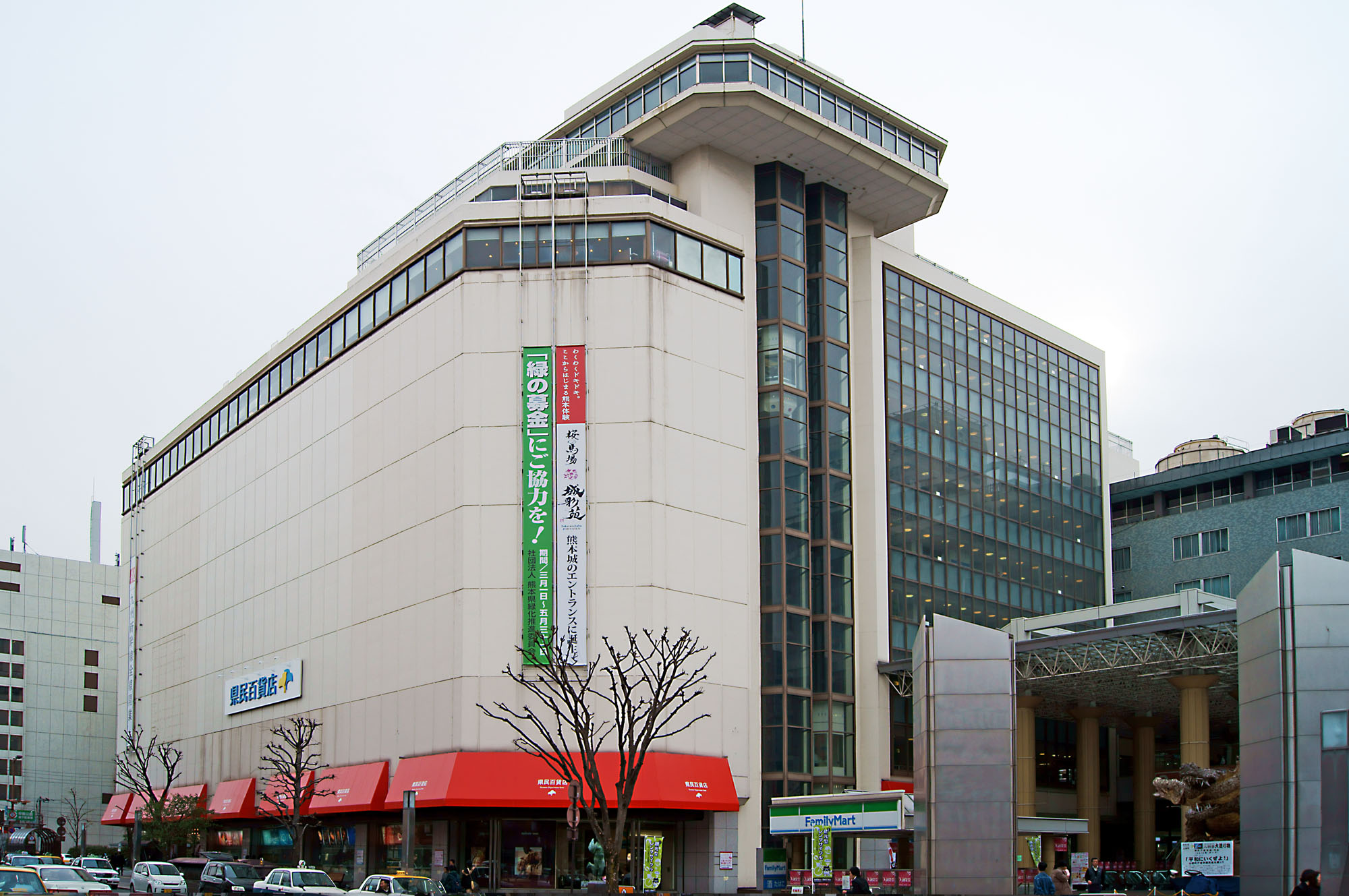 県民百貨店(熊本市） 交通センター側